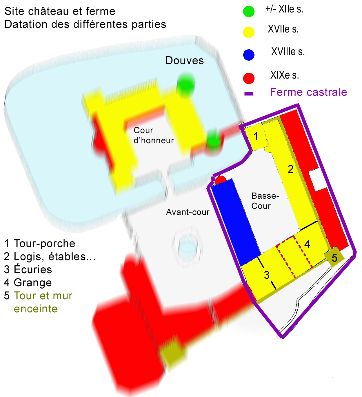 Étapes de la construction de la Ferme castrale de Hermalle-sous-Huy